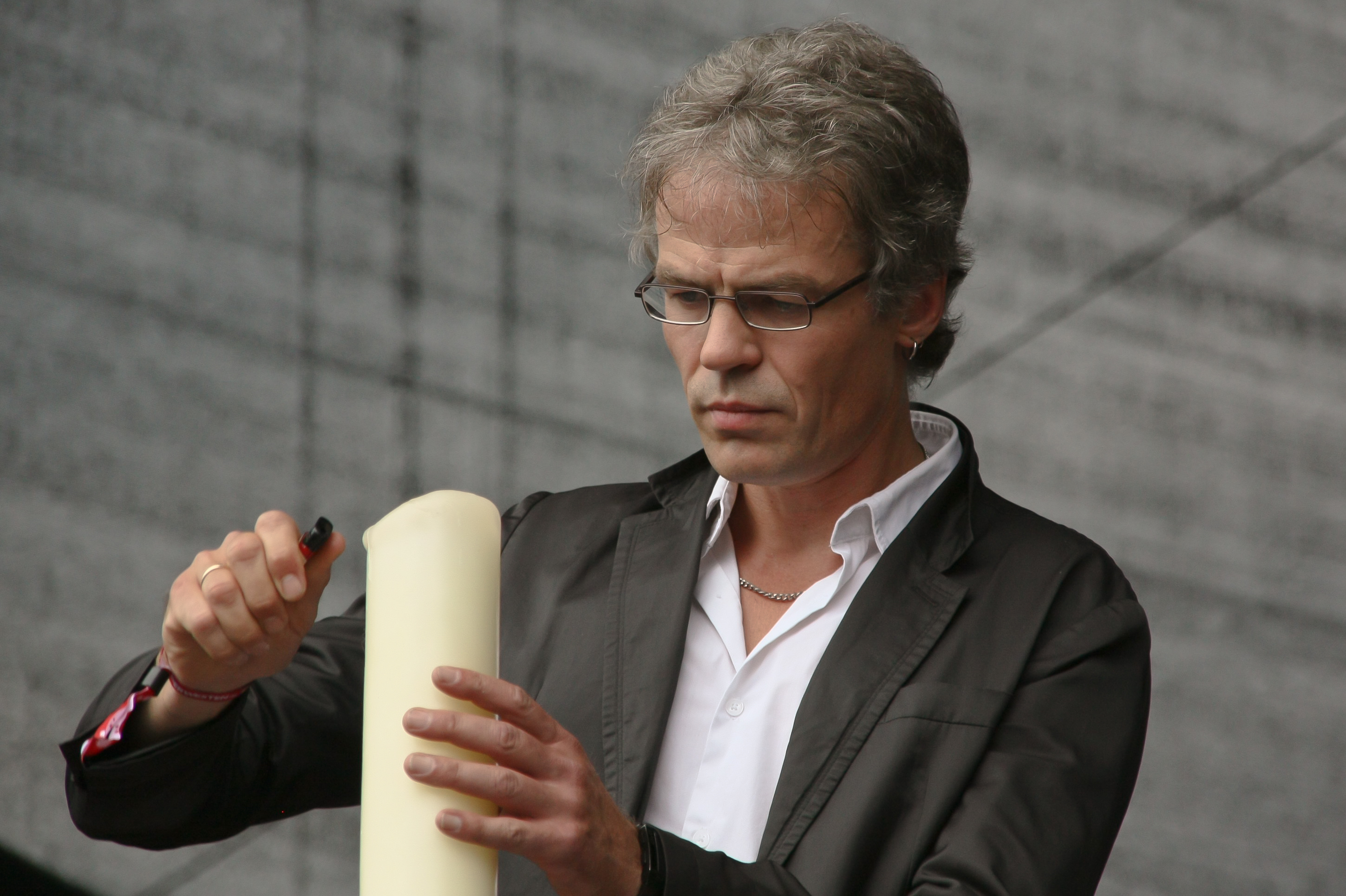 Gedenken an die Opfer der Loveparade 2010 beim Juicy Beats Festival in Dortmund (im Bild: Friedrich Laker, Pfarrer in Dortmund)